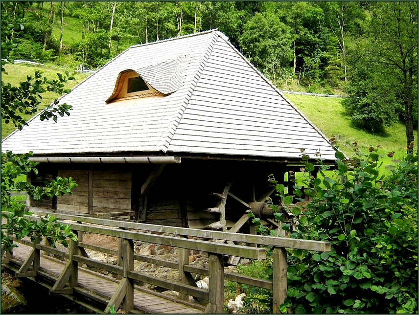 die alte Mühle im Glottertal bei Freiburg